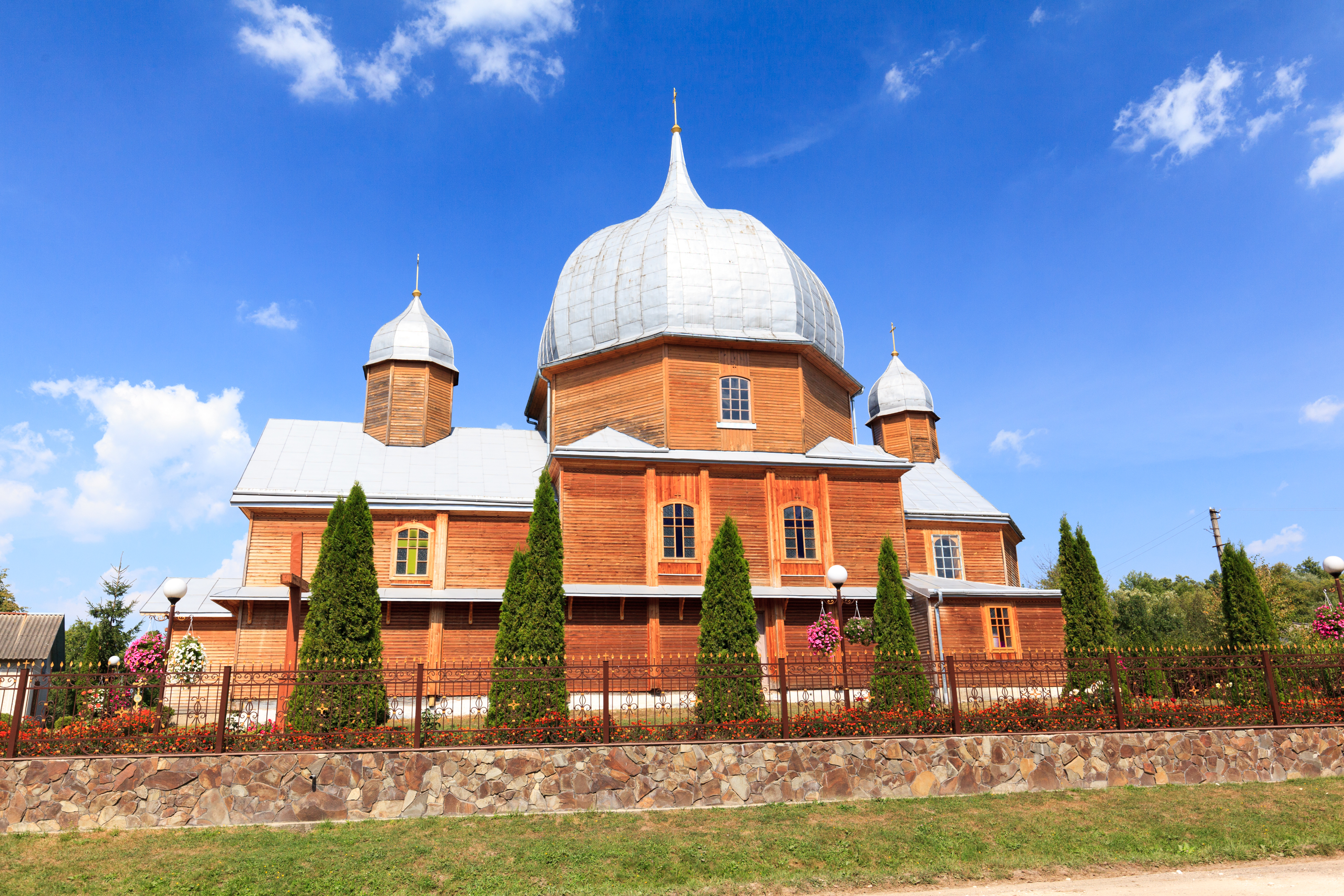 Церква Покрови Пресвятої Богородиці(дер.), с.Дрогомишль